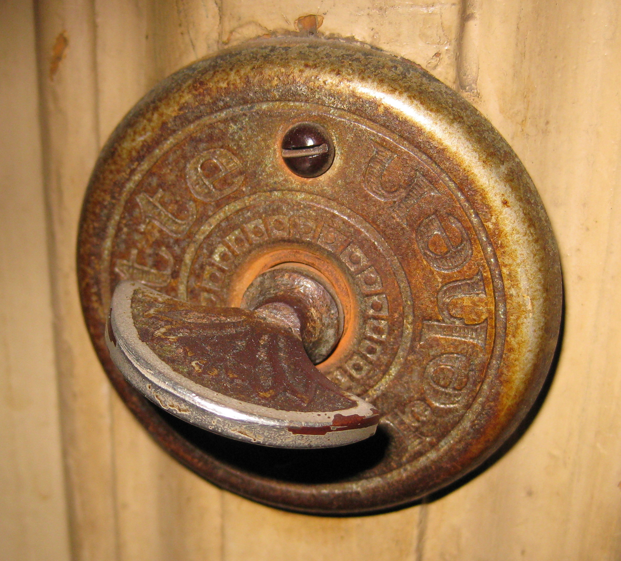 Wohnungstürklingel von1897 aus einem einfachen Mehrfamilienwohnhaus